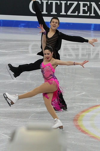 Селия Робледо и Луис Фенеро (Испания) на чемпионате мира по фигурному катанию среди юниоров 2012